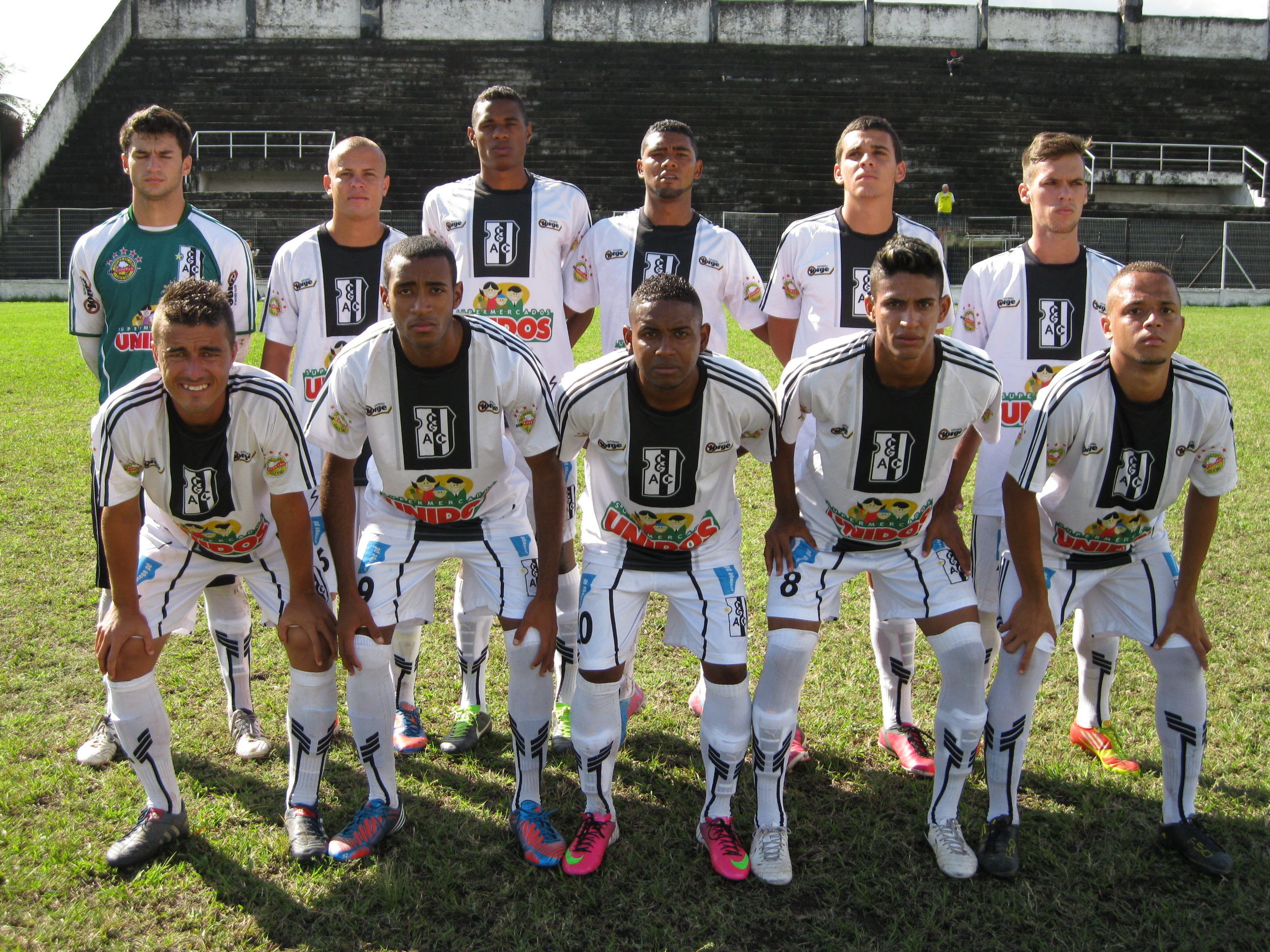 Equipe profissional do Campo Grande em 2013